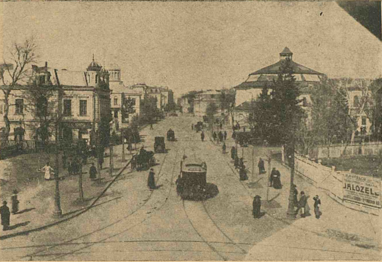 O vedere a străzii Colțea, mai târziu Bulevardul Brătianu. La dreapta: Panorama Griviței